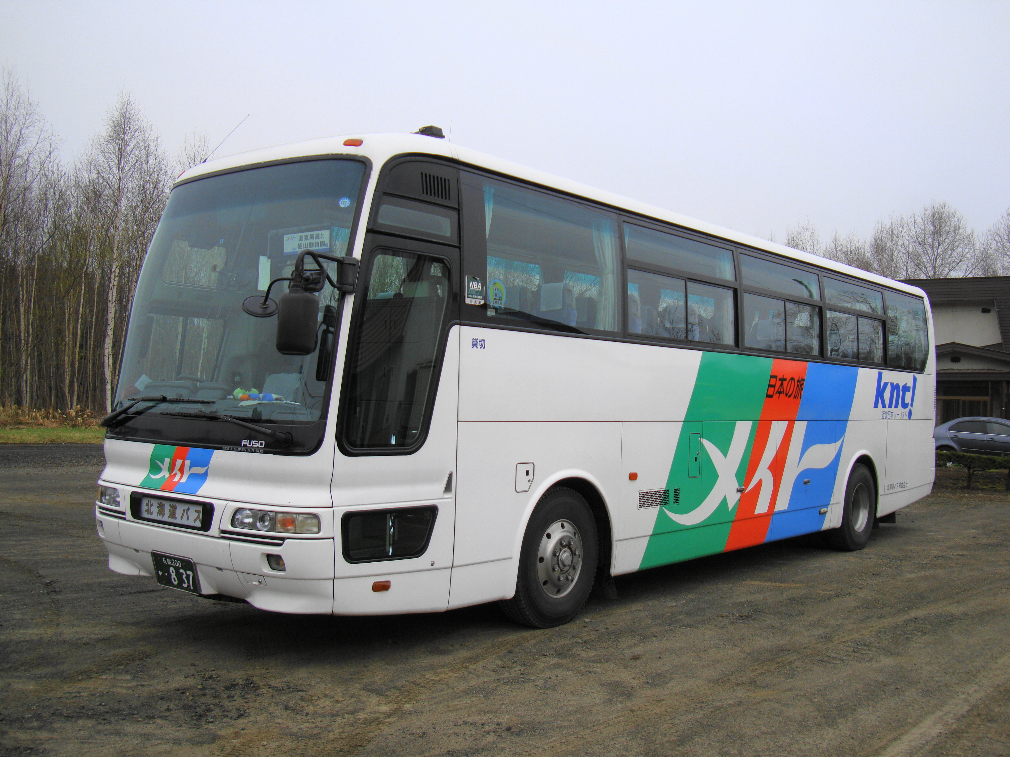 Kinki Nippon Tourist